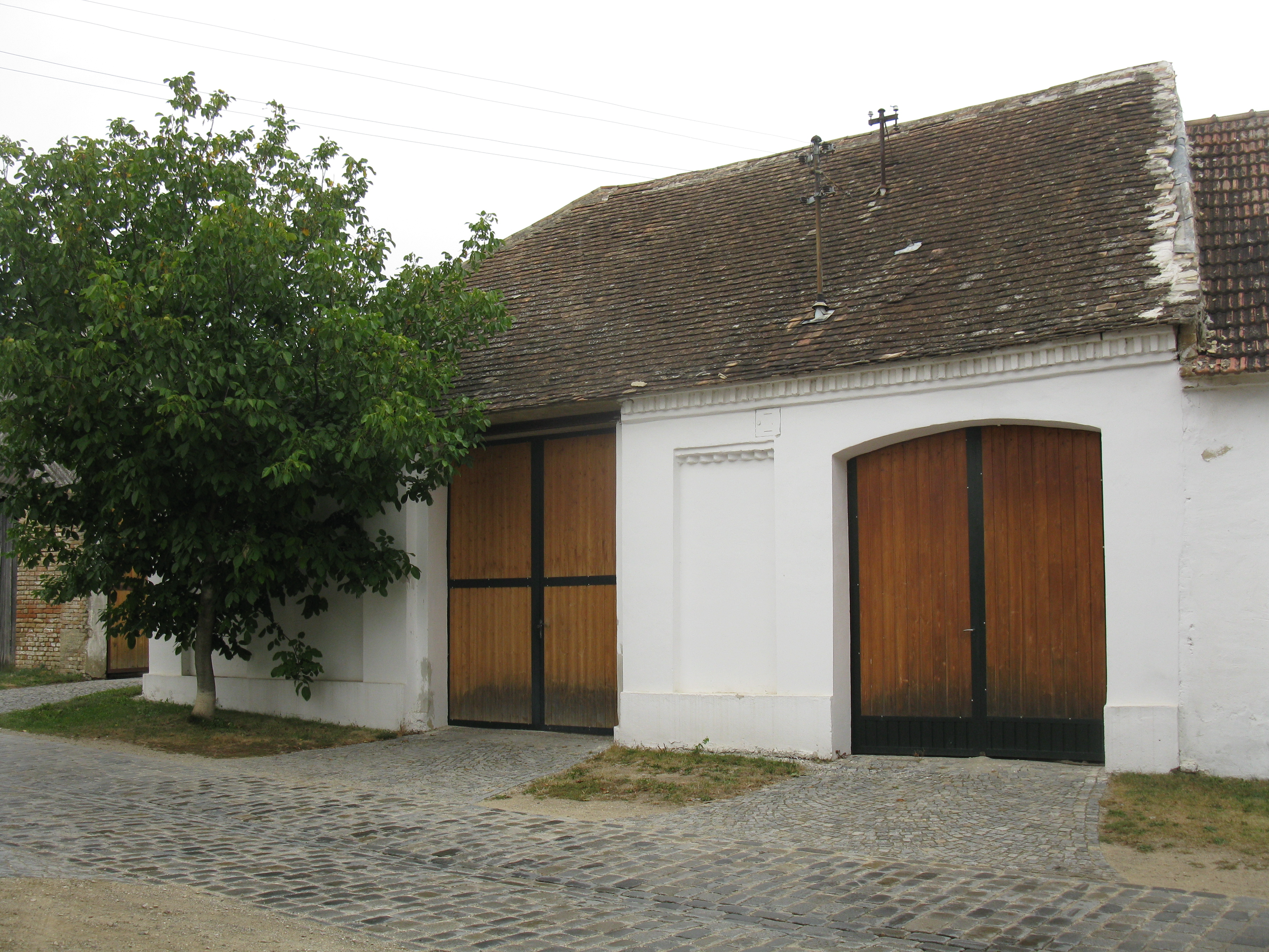 Scheune am Hintausweg, Großriedenthal.